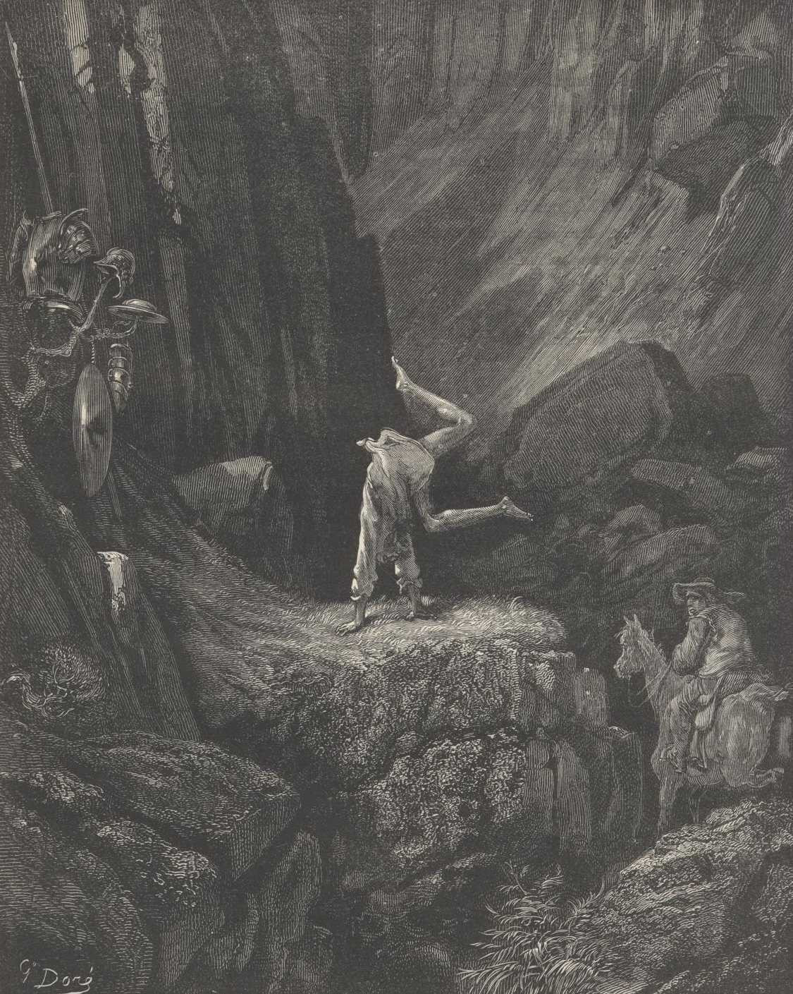 Ilustração de Gustave Doré para a edição de 1863 de "Dom Quixote" de Miguel de Cervantes